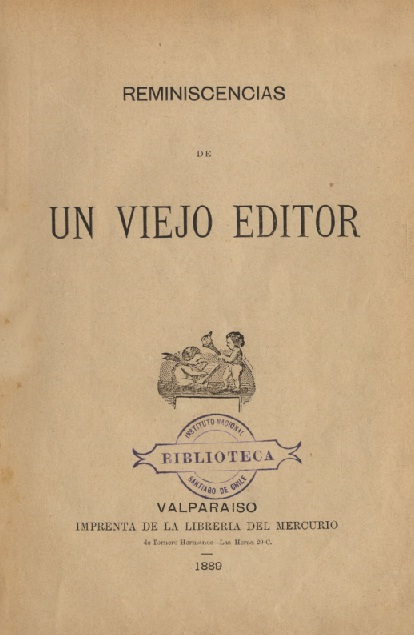 Portada del libro Reminiscencias de un Viejo Editor, publicada en el año 1894